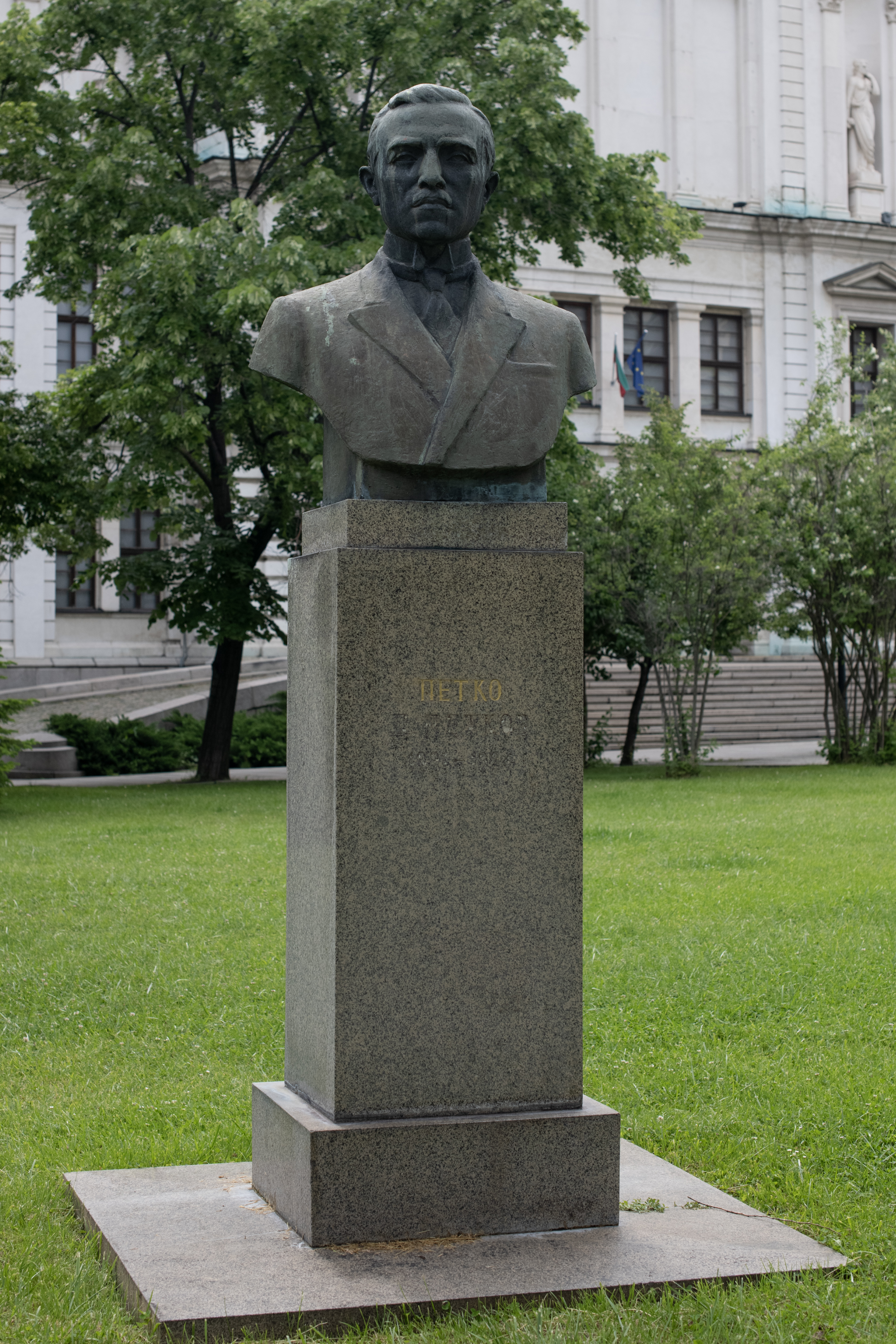 Снимката документира паметника на Петко Д. Петков пред сградата на Национална галерия за чуждестранно изкуство